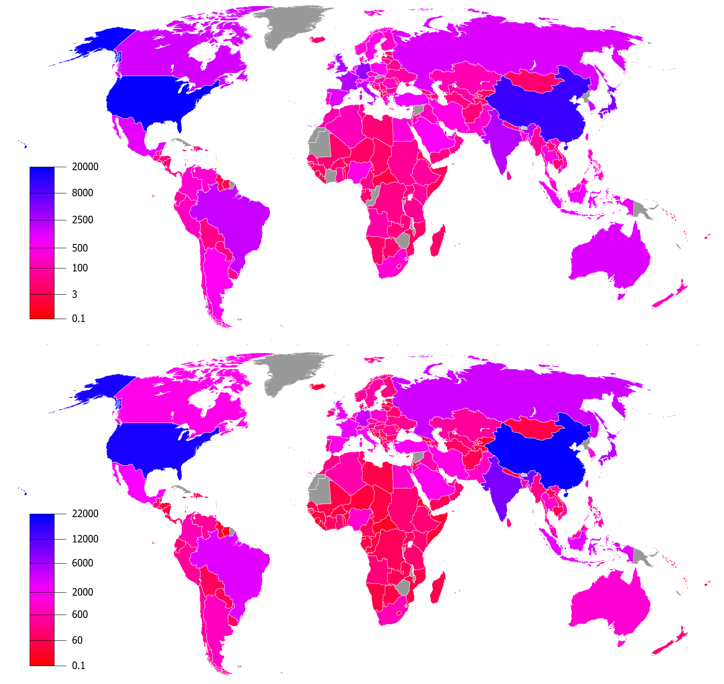 国別GDP（2016年、上はMERベース、下はPPPベース）